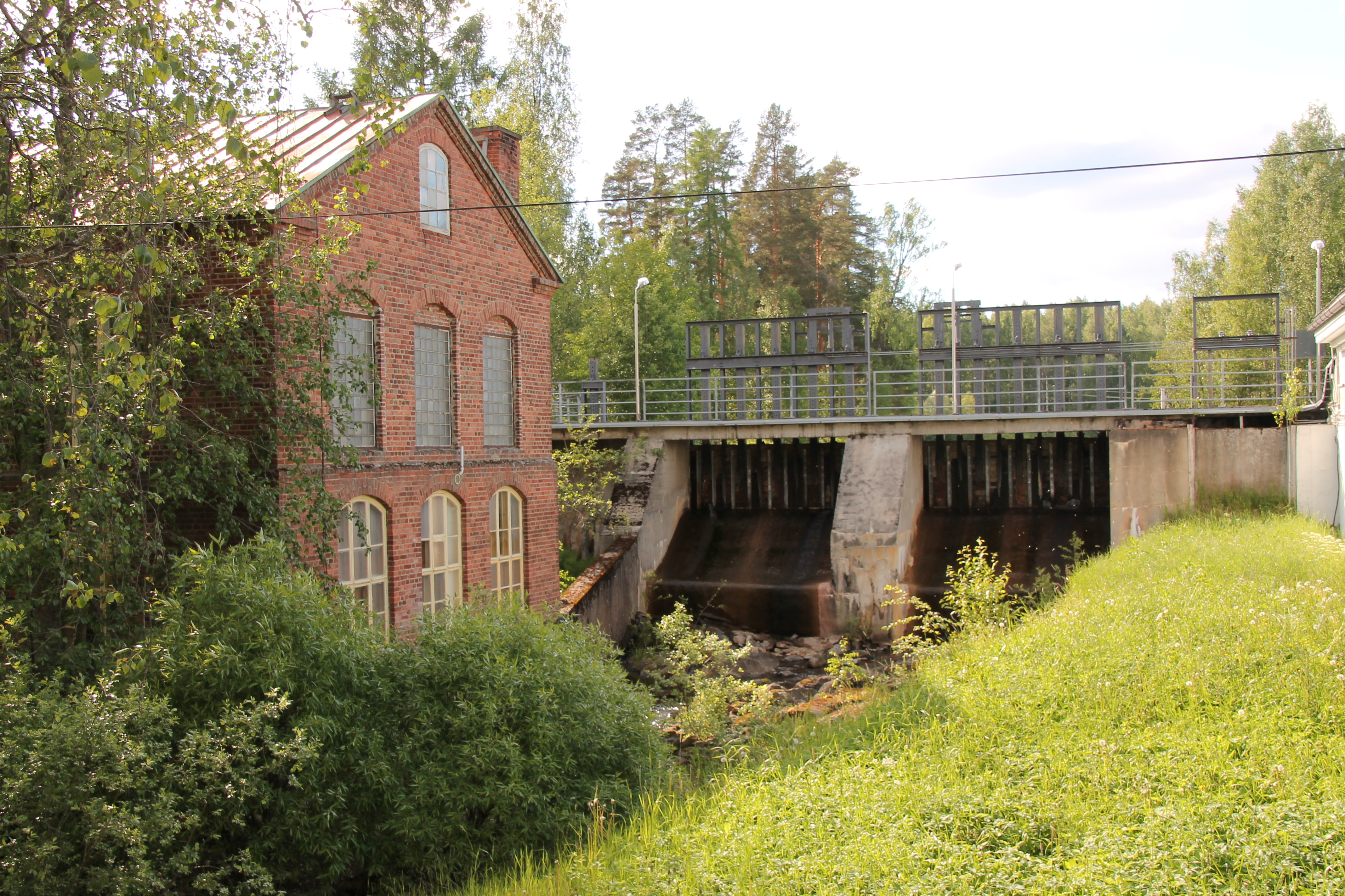 Alasorsan vanha voimalaitos Sorsakoskella.